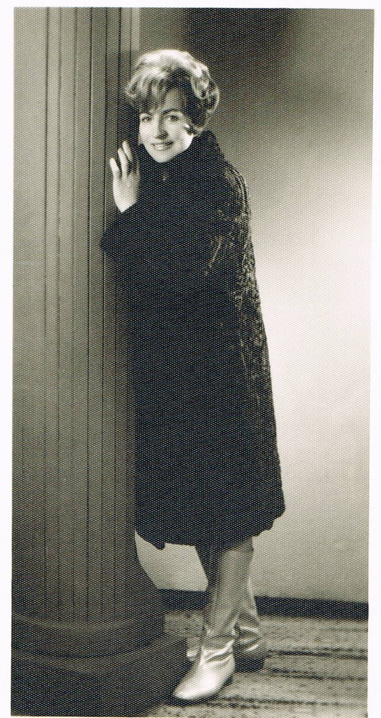 Zofia Janukowicz-Pobłocka - Polish opera vocalist